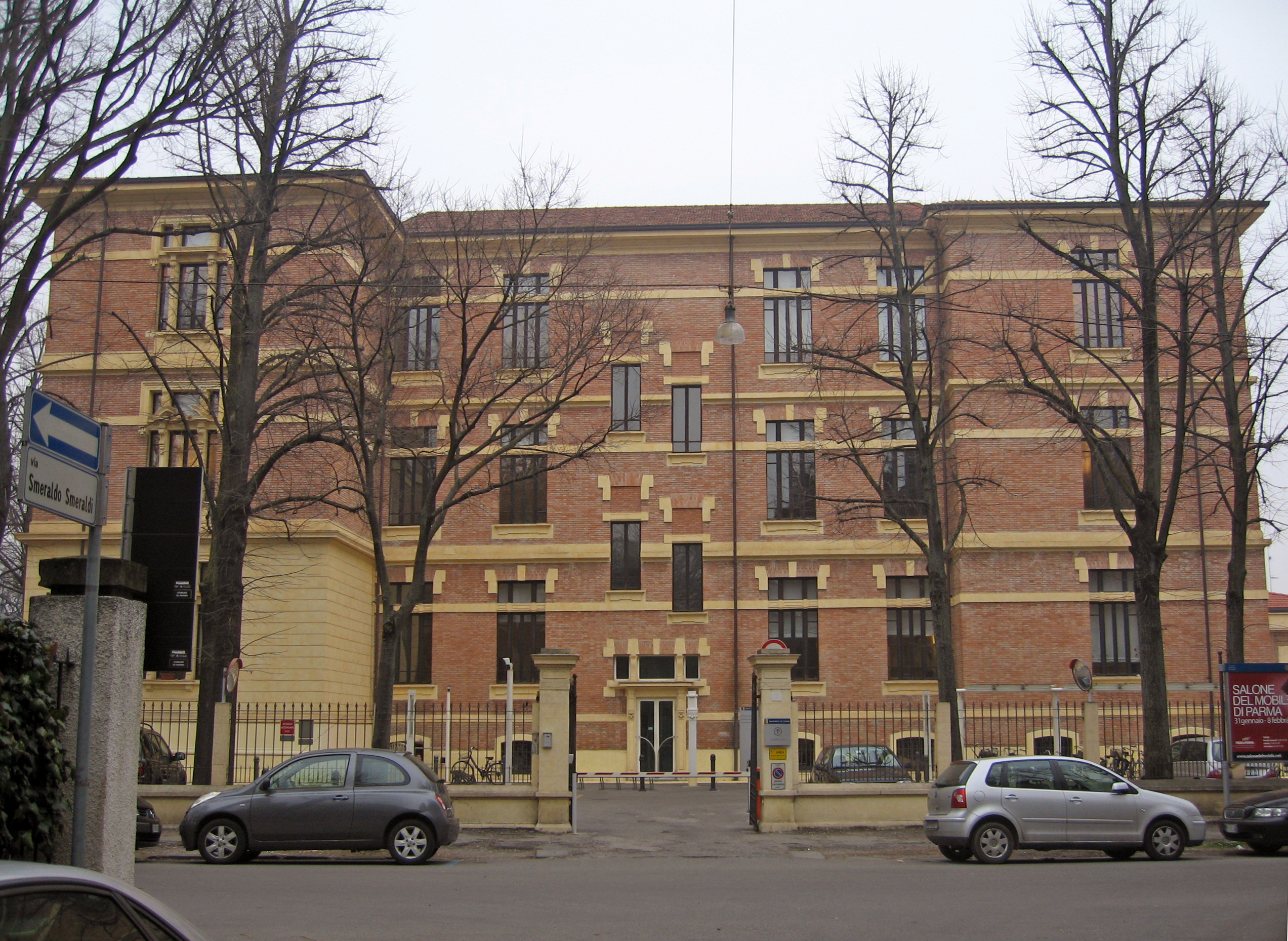 Palazzo Giordani (Parma) - facciata su via Passo Buole